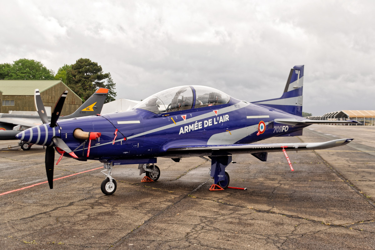 Pilatus PC-24 - Armée de l'air - - Nato Tiger Meet 2019